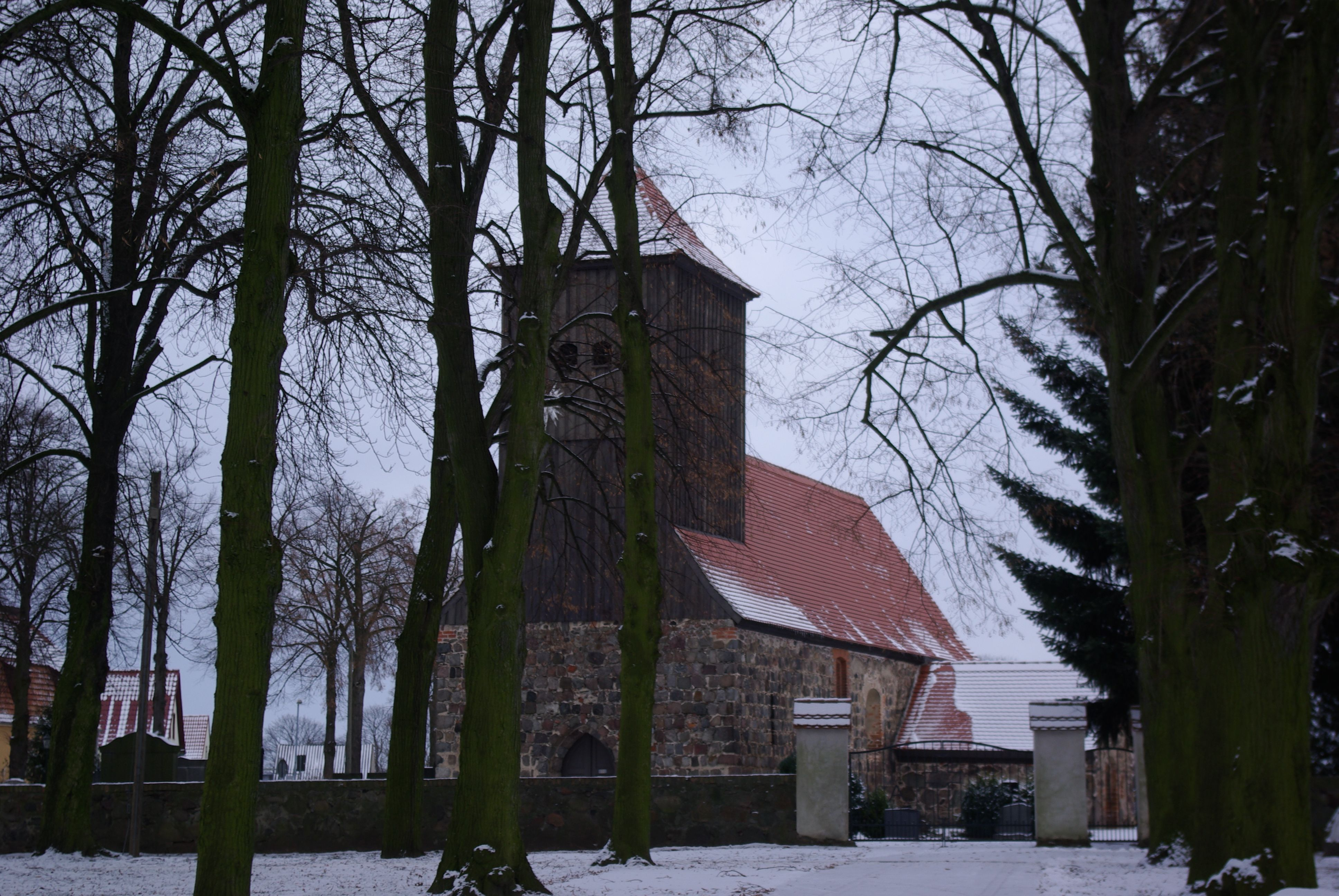 Blankenfelde-Mahlow, Brandenburg, Kirche im Ortsteil Groß Kienitz, Blick von der Dorfstraße aus (geotags in den exif-daten).